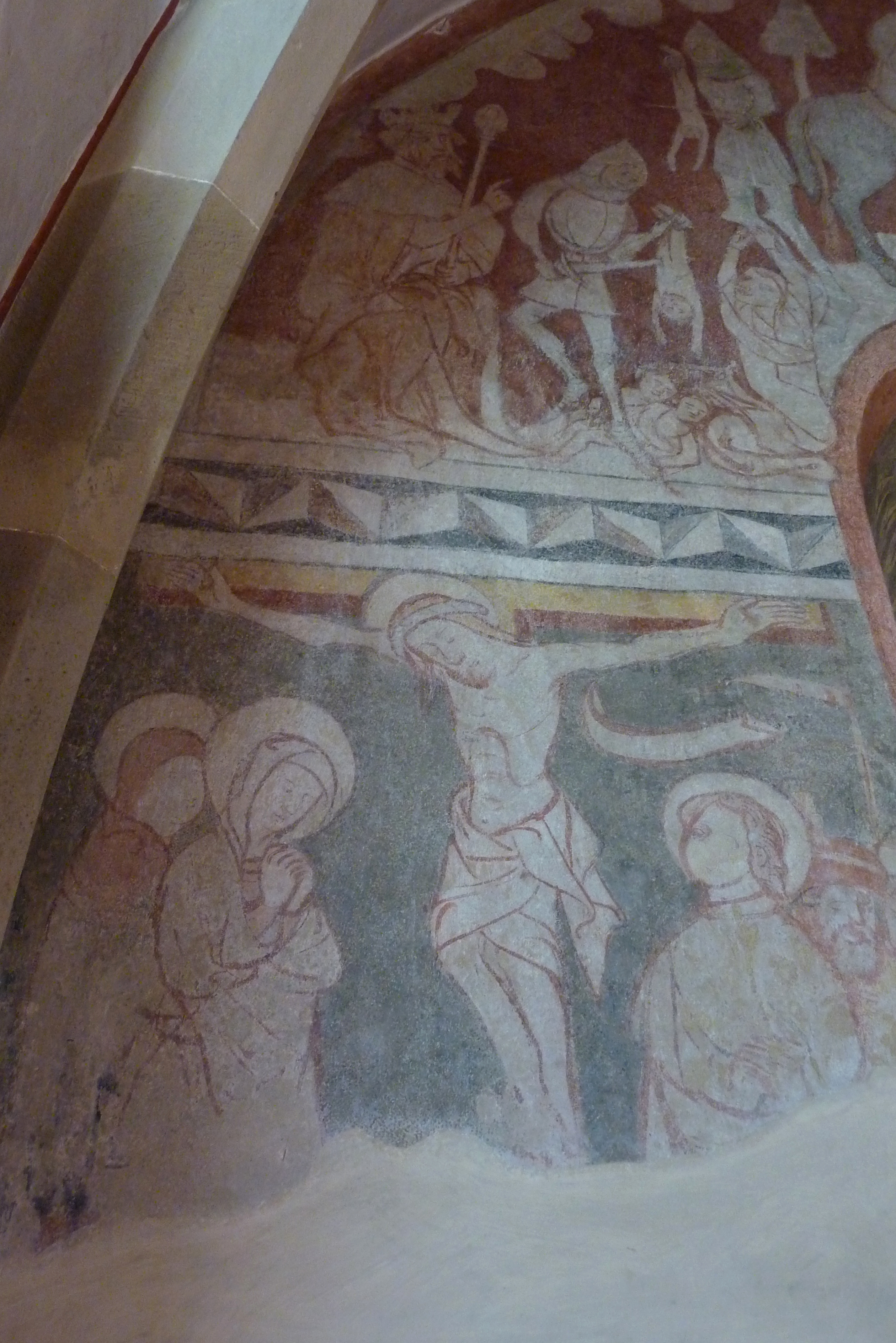 Evangelische Pfarrkirche St. Peter und Paul in Oberderdingen (im ehemaligen Dorf Unterderdingen) in Baden-Württemberg, Wandmalerei um 1380, Darstellung: Kreuzigung Christi